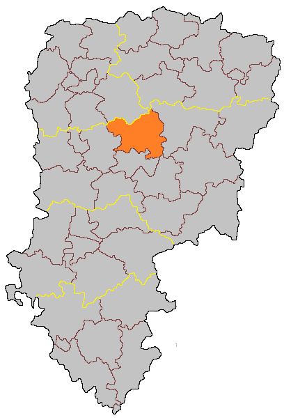 Кантон Креси-сюр-Сер на карте департамента Эна